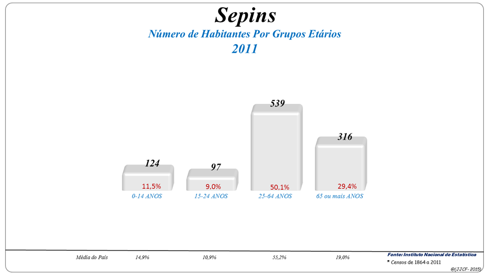 População